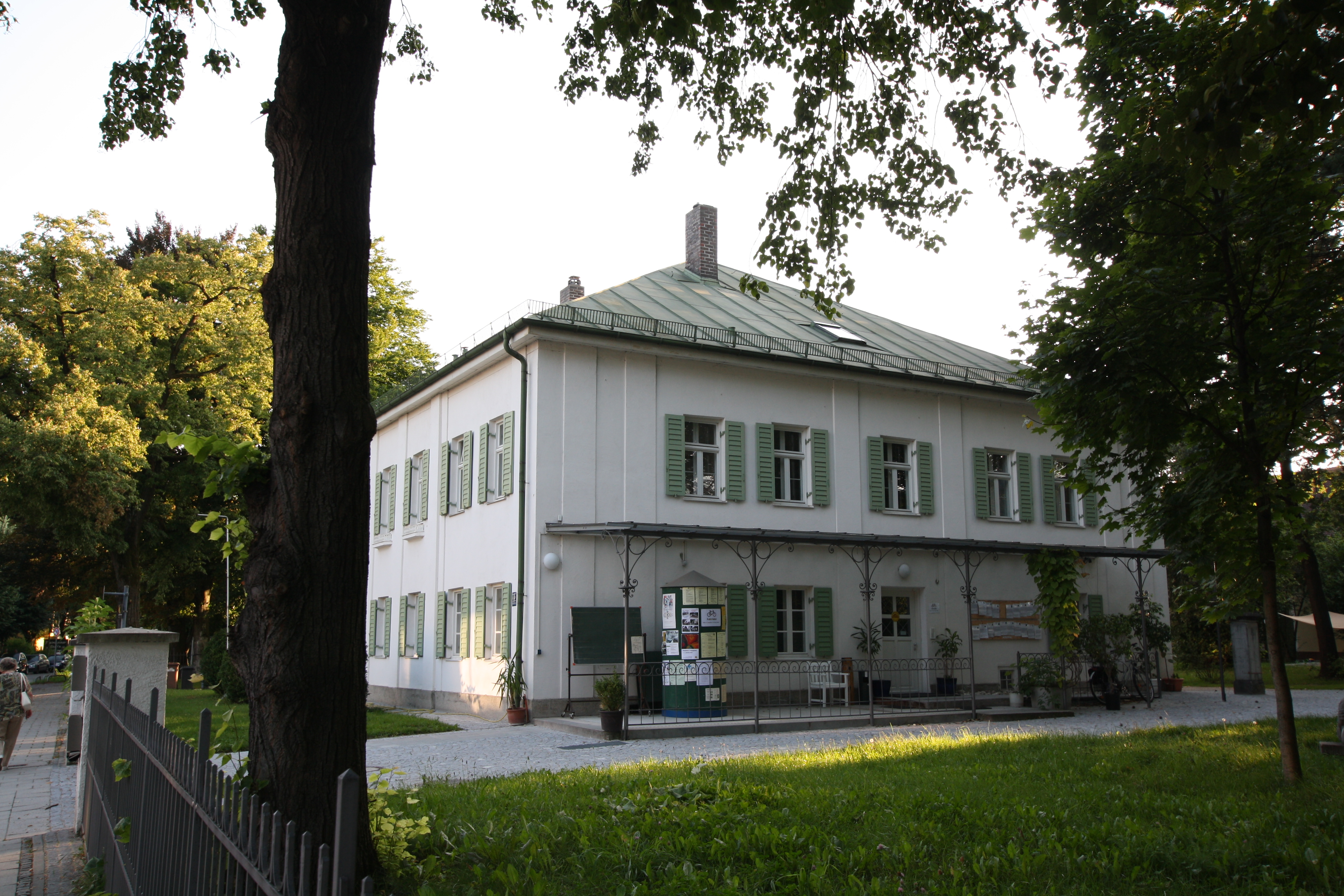 Mohr-Villa, Situlistr. 75, München-Freimann